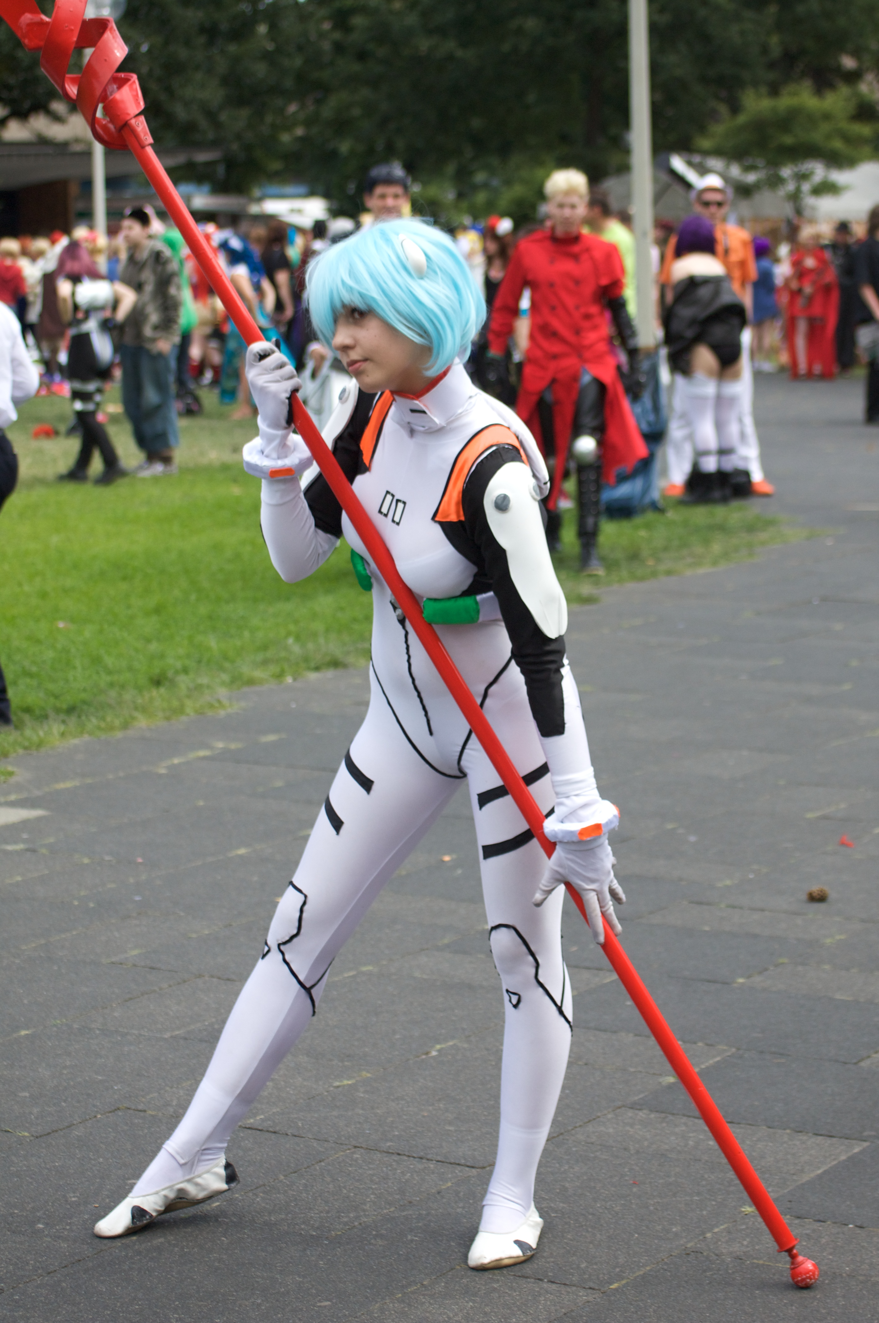 Cosplay: Rei Ayanami (Neon Genesis Evangelion)